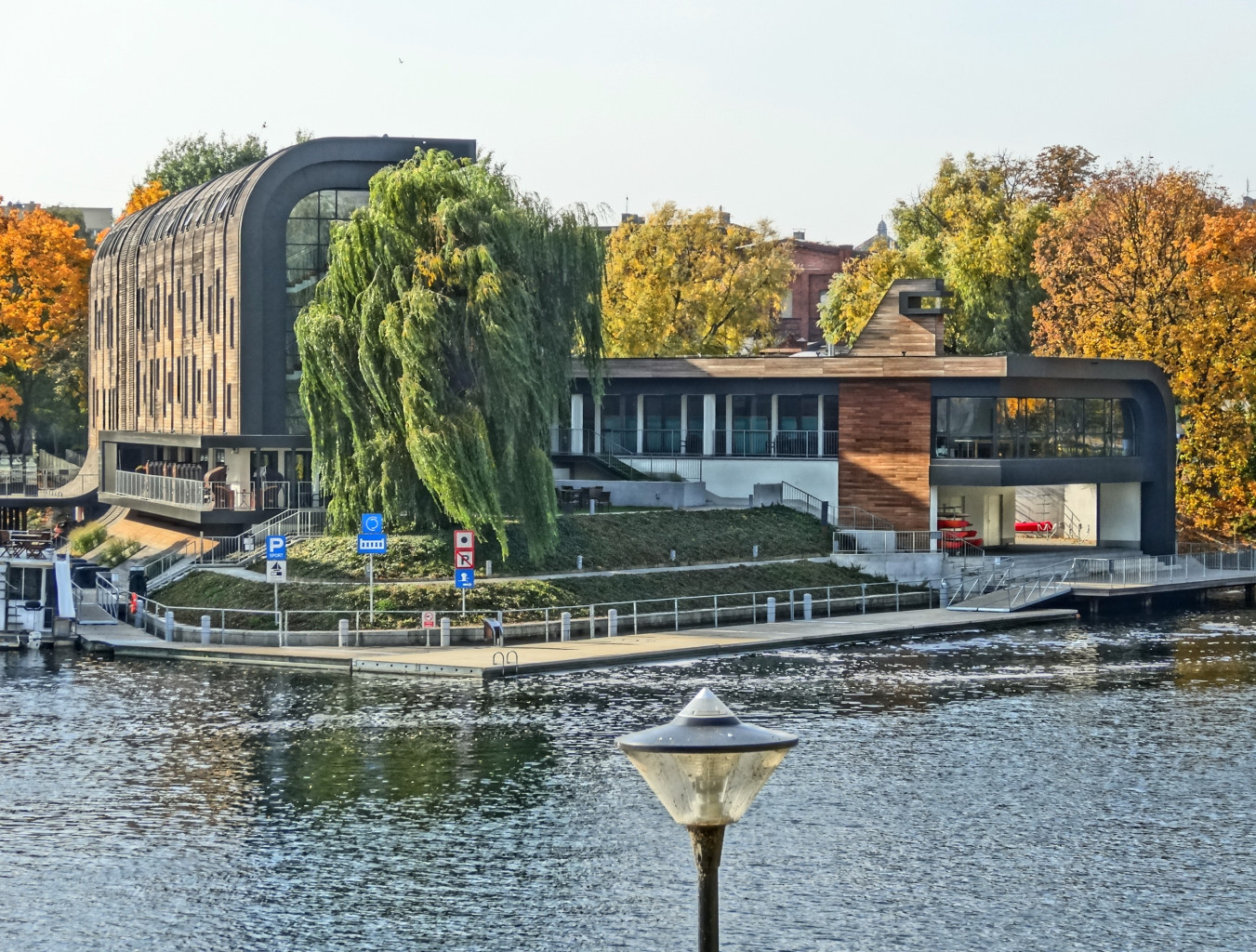 Przystań Bydgoszcz na Wyspie Młyńskiej